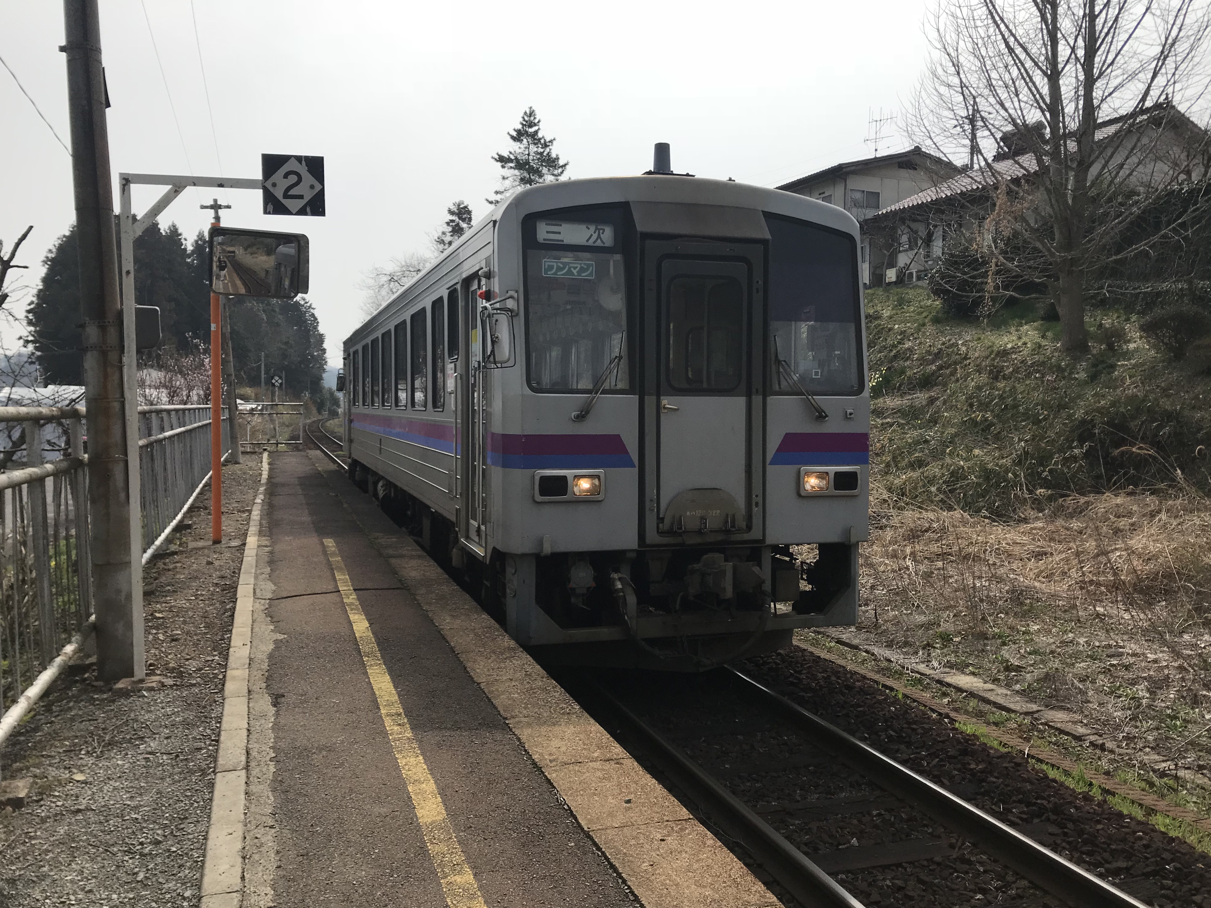 八次駅に到着する三次行き普通列車